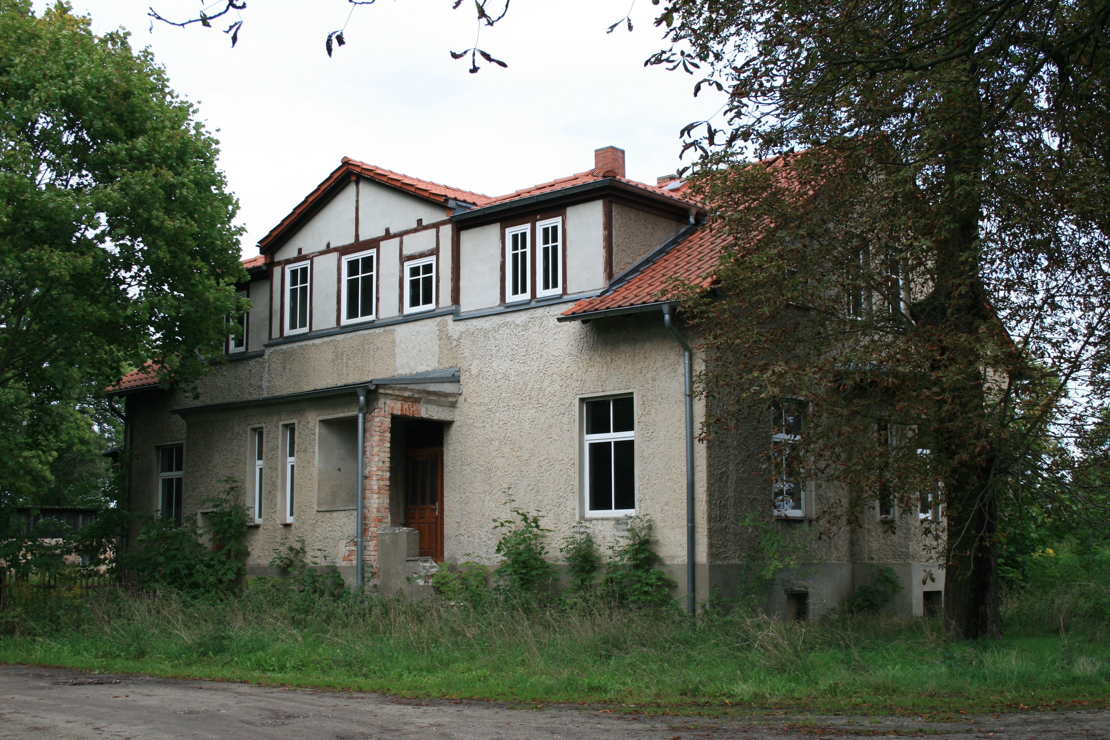 Baudenkmal des ehemaligen Rittergutes Bomsdorf - Ansicht von Süden